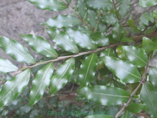 Doratoxylon apetalum